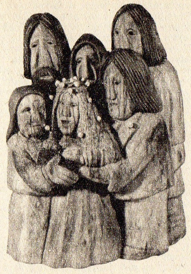 Edward Kołacz - polski artysta rzeźbiarz ludowy. Rzeźba "Wesele".